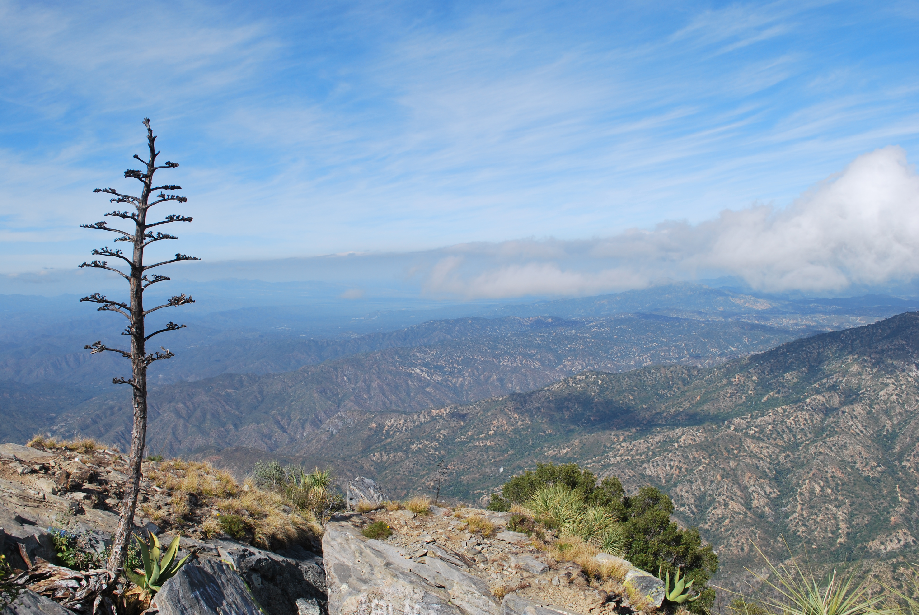 Panorámica desde el picacho, el la sierra de la laguna